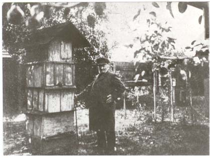 Jan Dzierżon w pasiecie w Łowkowicach, 1901 r.